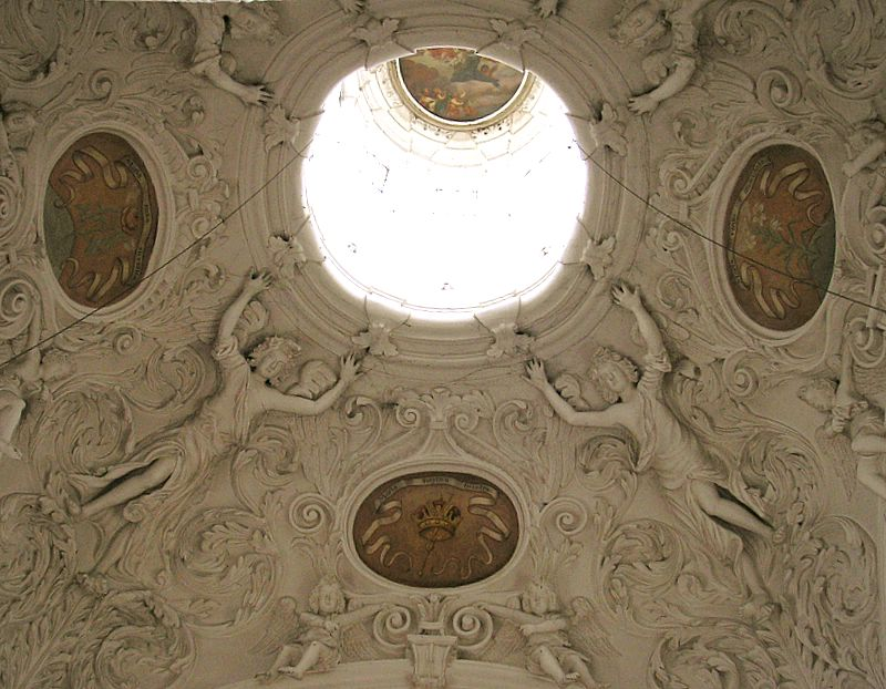 Wallfahrtskapelle Maria Alber (Friedberg, Landkreis Aichach-Friedberg, Bayerisch-Schwaben). Blick in die Kuppel. Eigene Aufnahme, März 2007 / Pilgrimage chapel Maria Alber near Friedberg (Bavaria, Germany). Interior, looking up to the dome. Own photo, March 2007